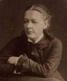 Photographie de Maria Troubnikova publiée par la Ligue pan-russe pour l'égalité des femmes